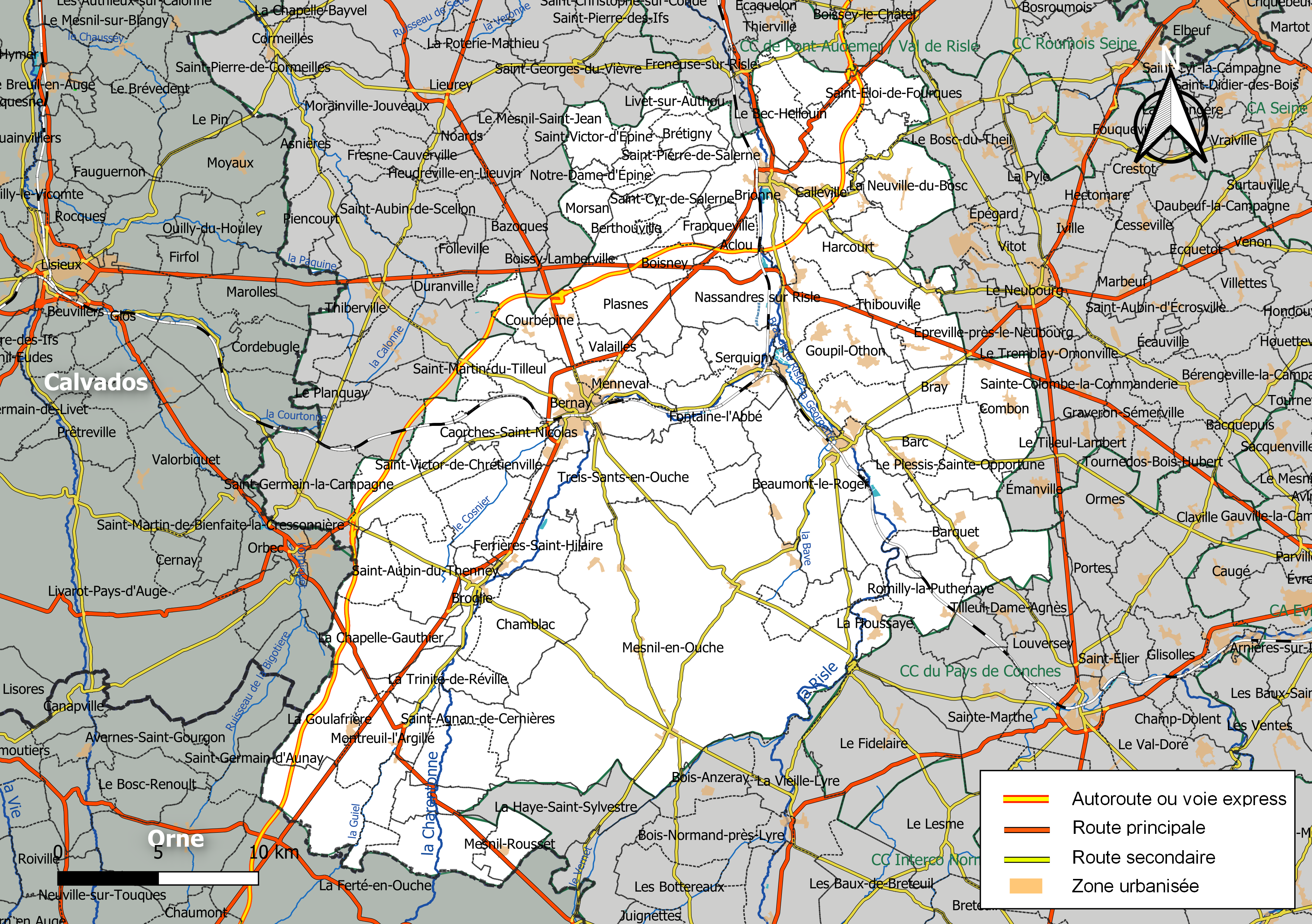 Carte géographique de la Communauté de communes Intercom Bernay Terres de Normandie, département de l'Eure, France. Composition au 1er janvier 2019.